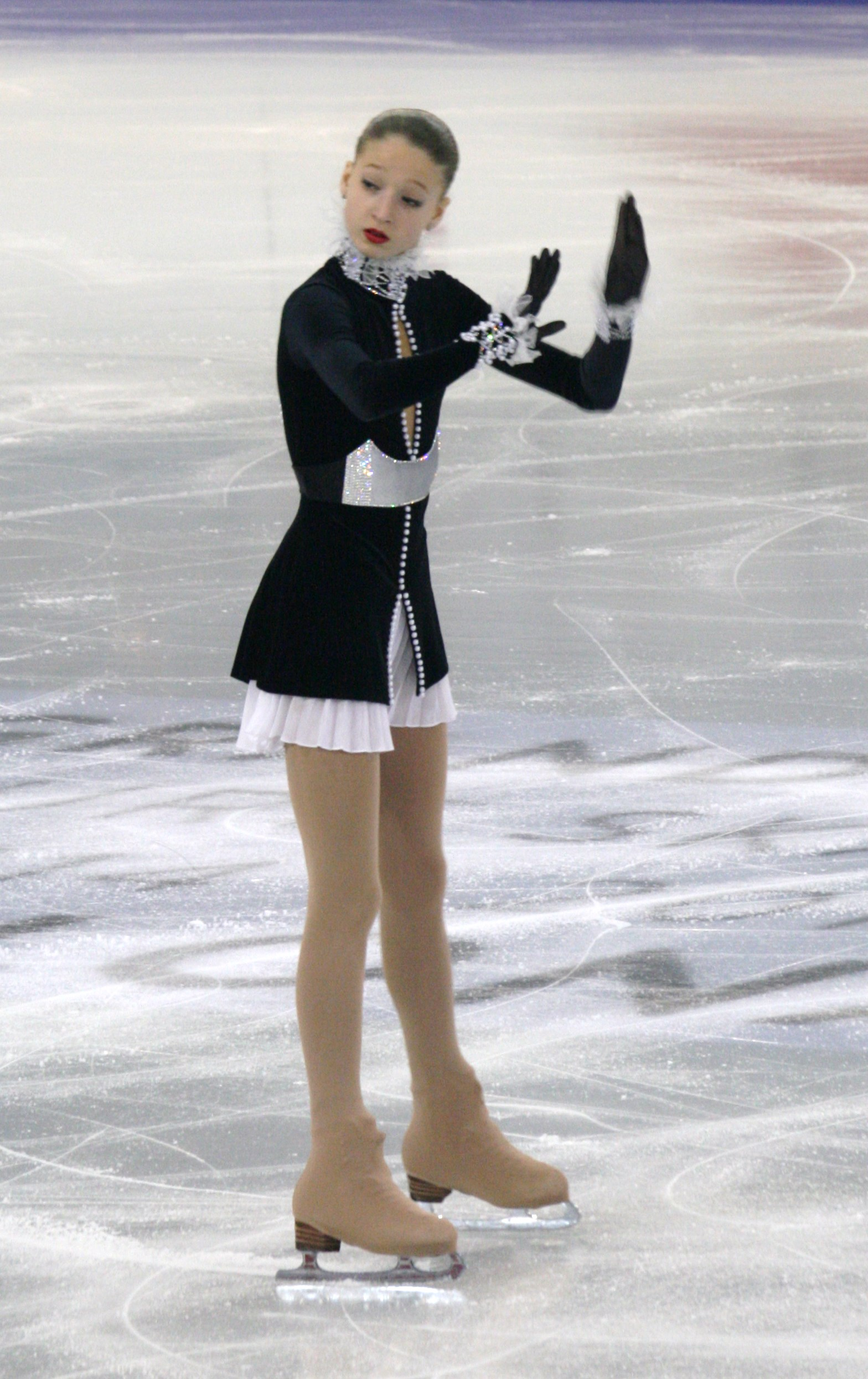 Мария Сотскова (Россия) на финале Гран-при по фигурному катанию среди юниоров 2014-2015.